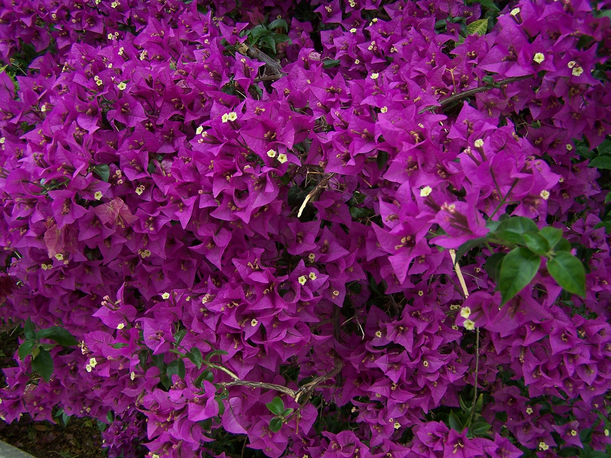 Flor nos Jardins Tropicais - do Parque das Nações